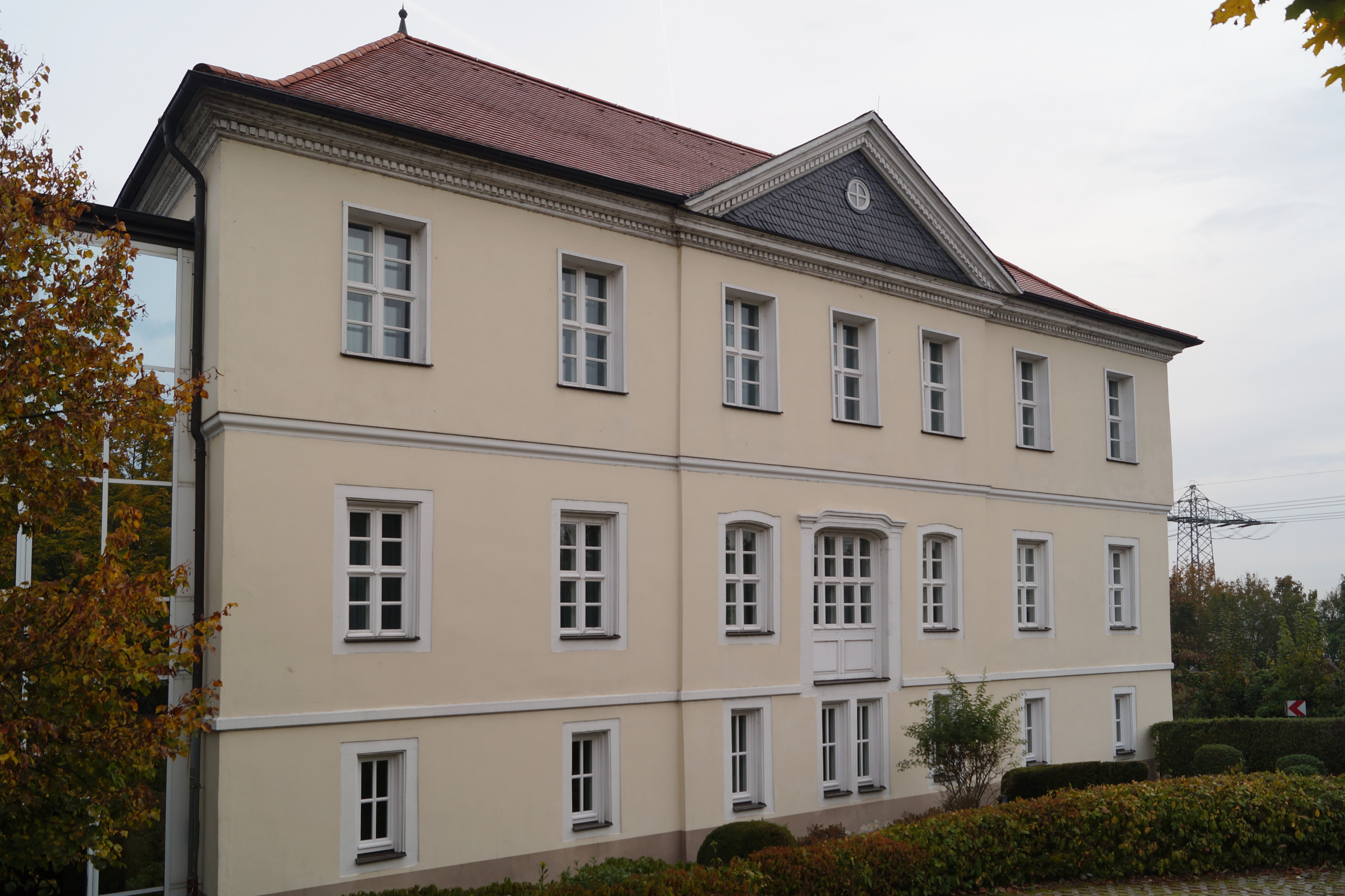 Villa Stokkum in Hanau-Steinheim, Ansicht des barocken Wohngebäudes von der Straßenseite.